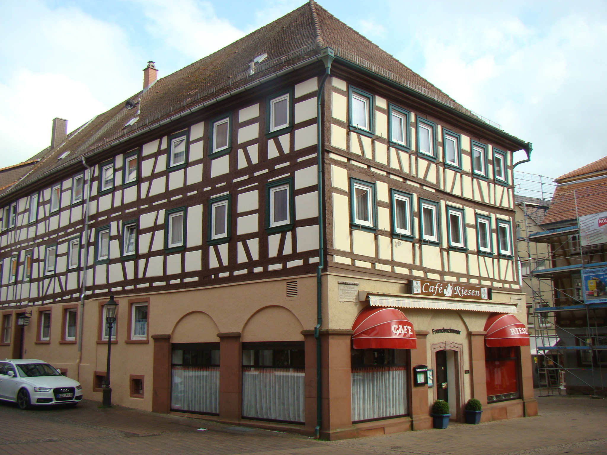 Buchen, Emele-Geburtshaus